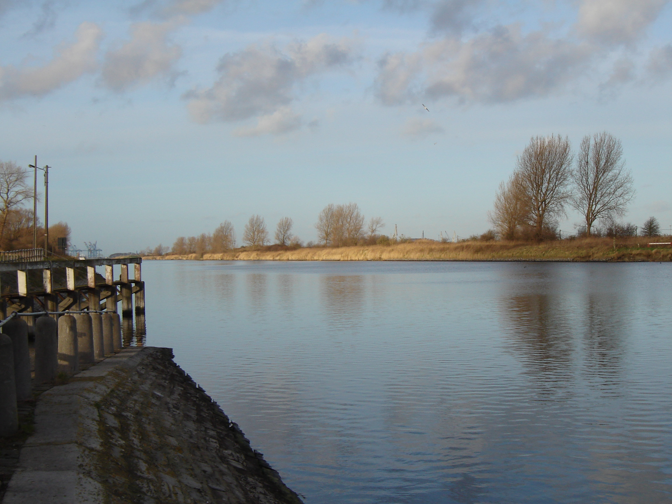 Boudewijnkanaal in Lissewege in Bruges, West-Flanders, Belgium. Canal connecting Port of Zeebrugge with Bruges